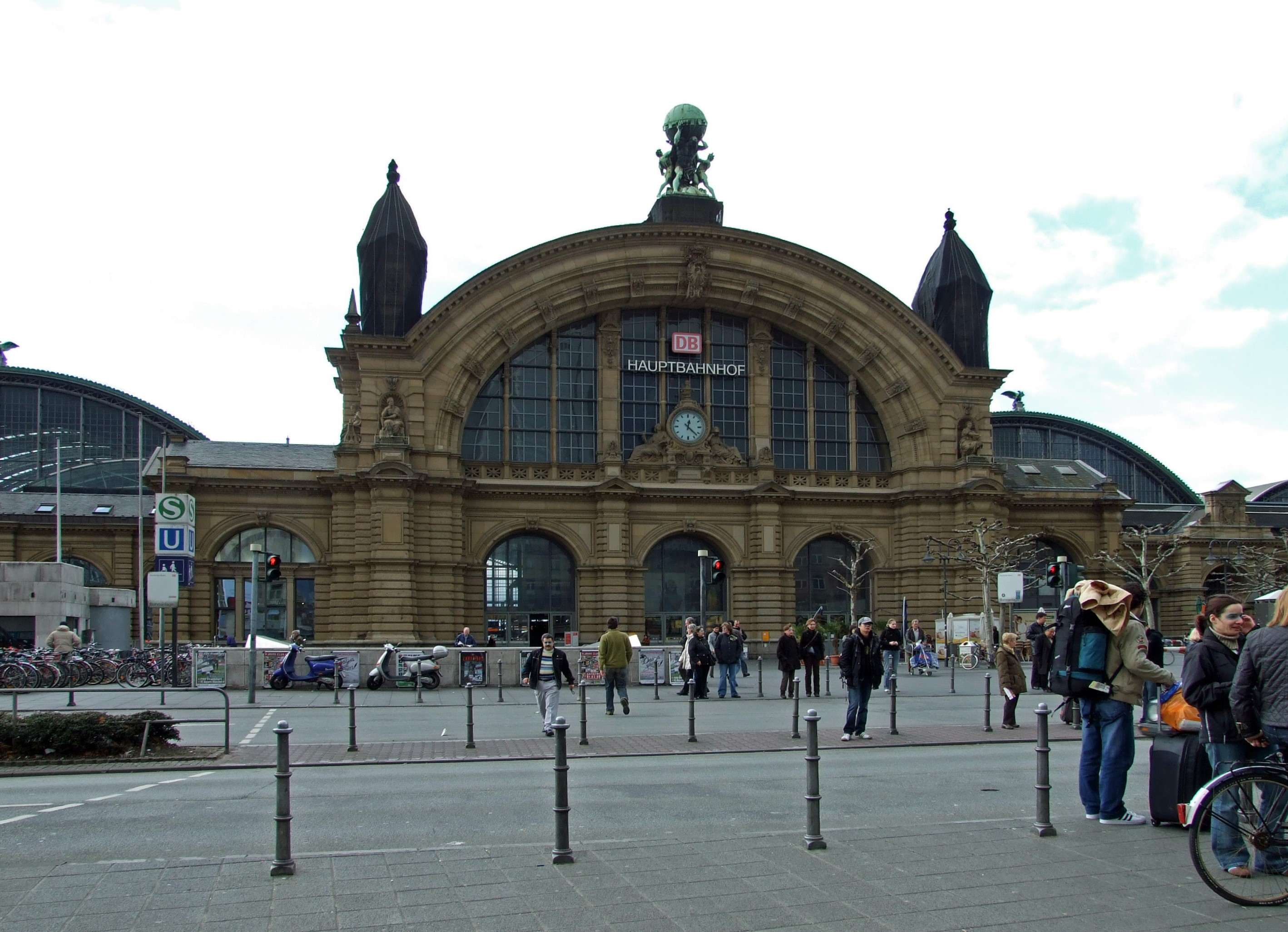 Hauptbahnhof, Haupteingang, Ffm